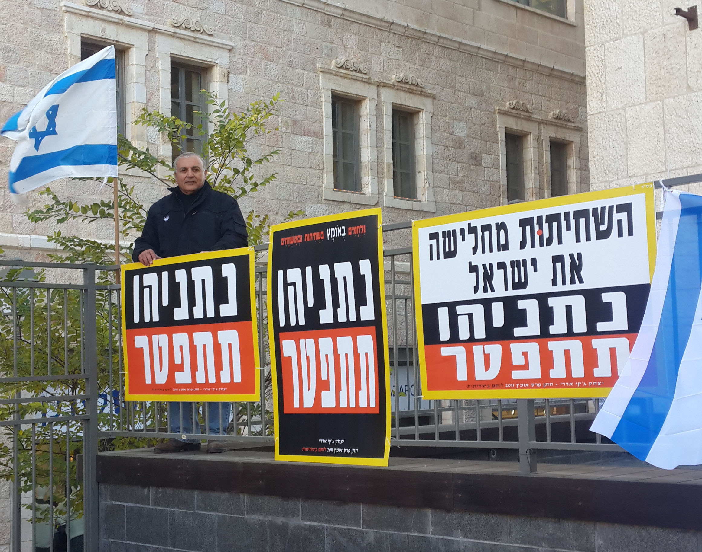 מסע עוטף ישראל במחאה אישית, בהפגנת יחיד.